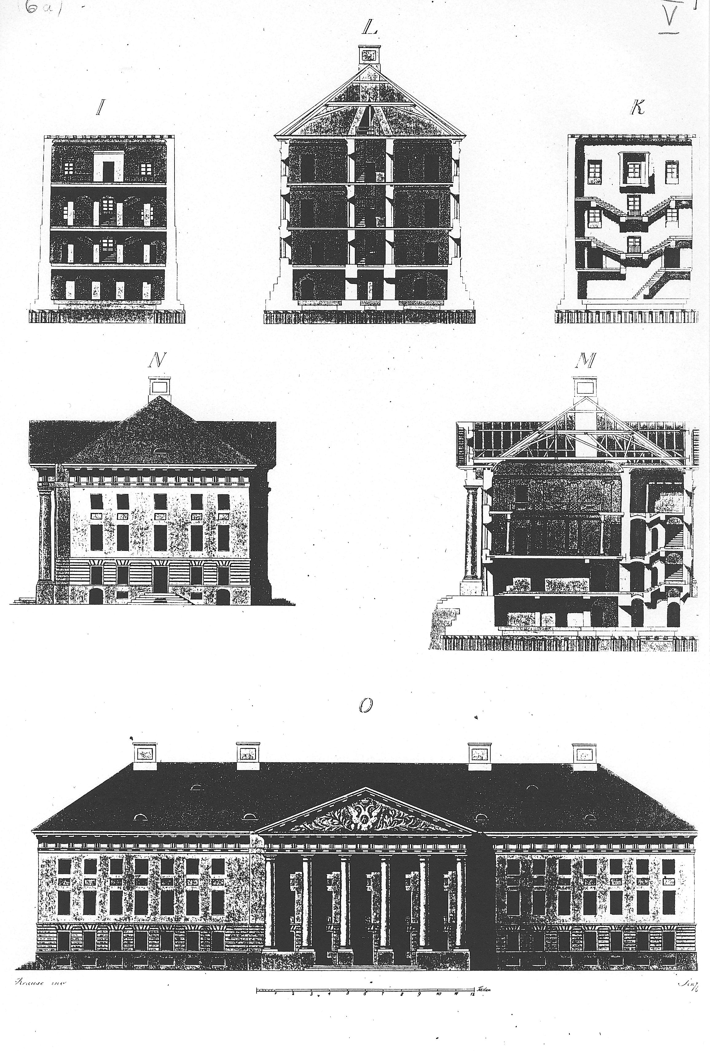 Riss-Zeichnungen für das Hauptgebäude, Universität Dorpat